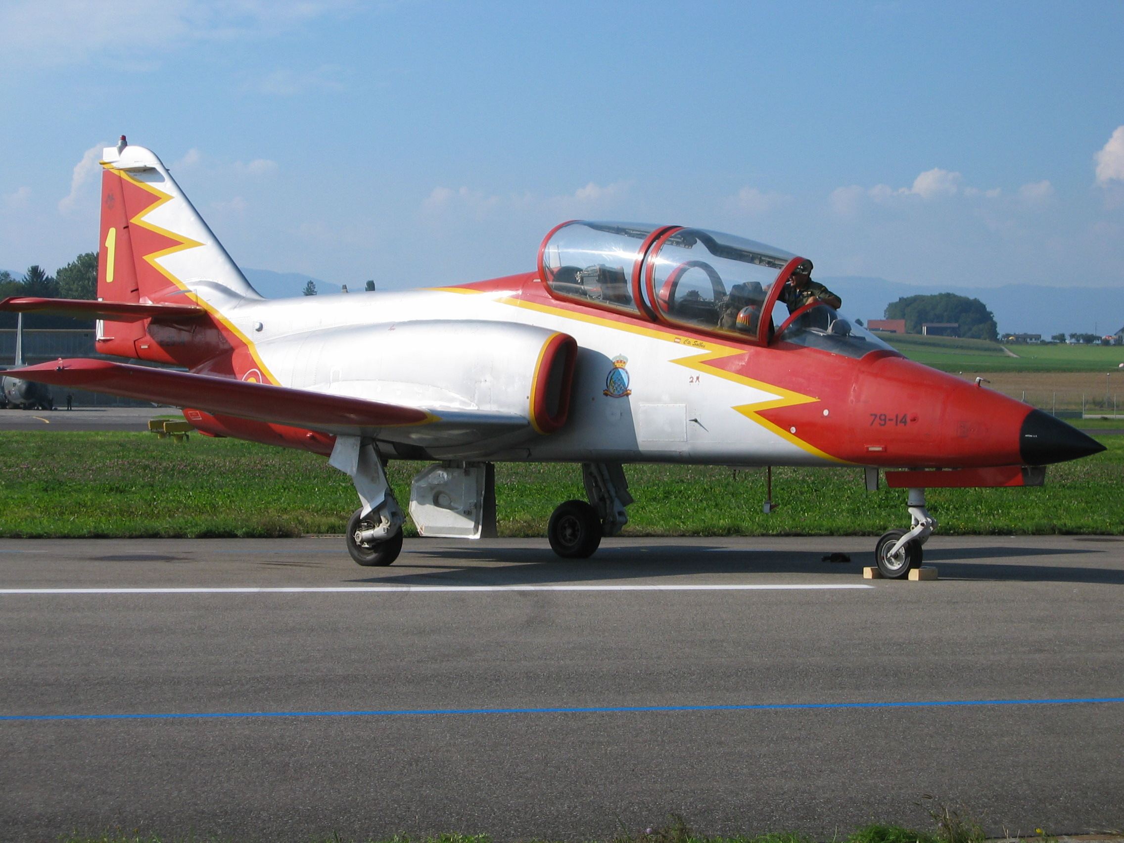 Casa 101 der spanischen Luftwaffe in Payerne